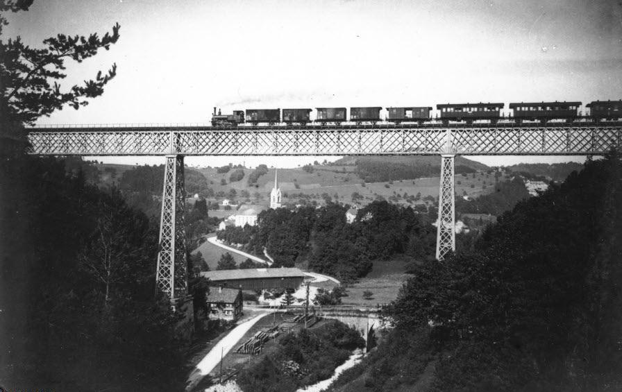 Guggenlochbrücke in Lütisburg (Toggenburg). Die 1875 fertig gestellte Brücke wurde 1945 als Steinbogenbrücke neu gebaut.